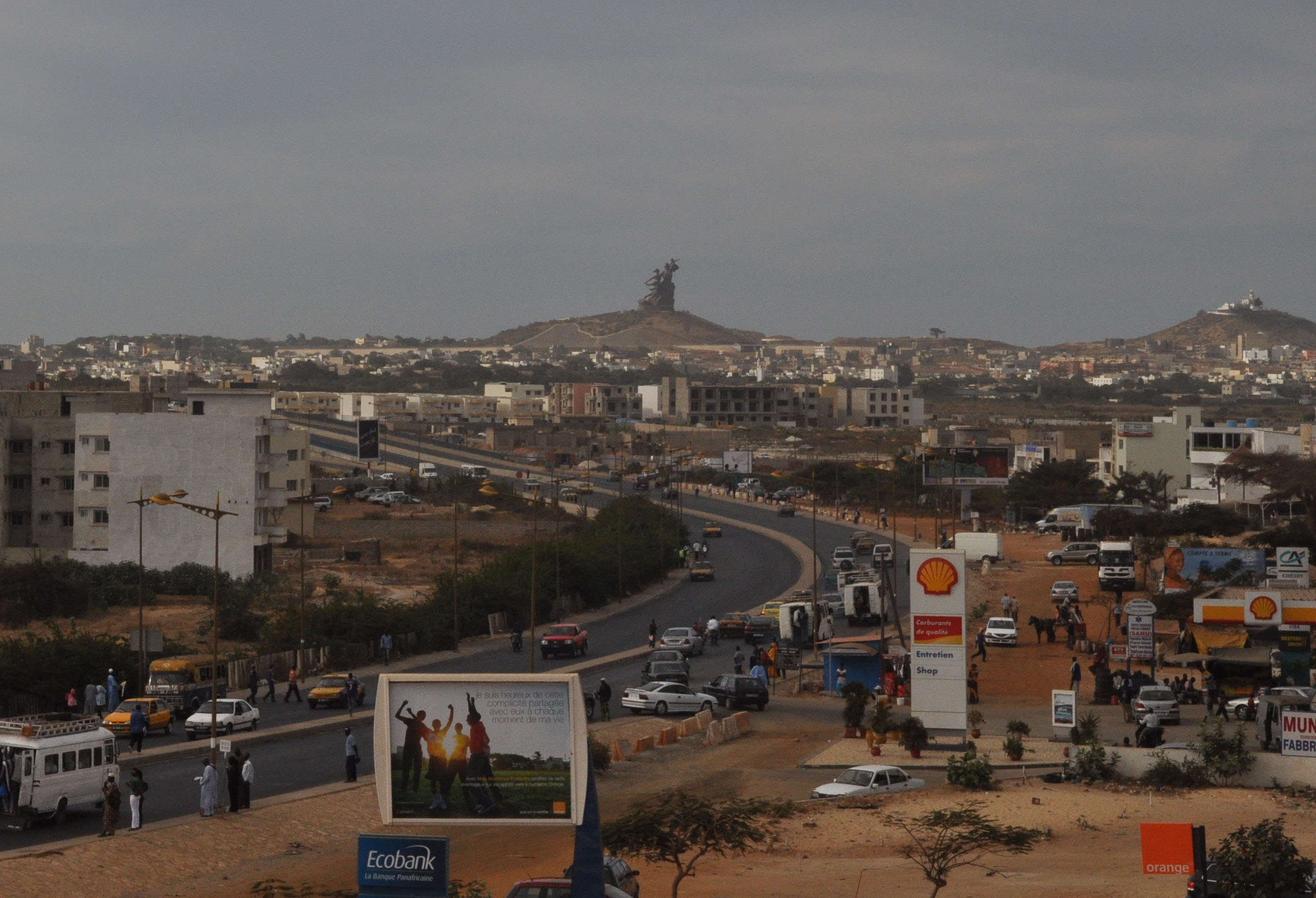 Les Mamelles, collines volcaniques de Dakar (Sénégal). A gauche, le Monument de la Renaissance ; à droite le phare des Mamelles